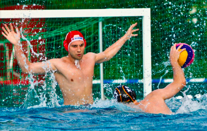 Kapitän und Torhüter Salkan Samardzic im Tor der Salzburger